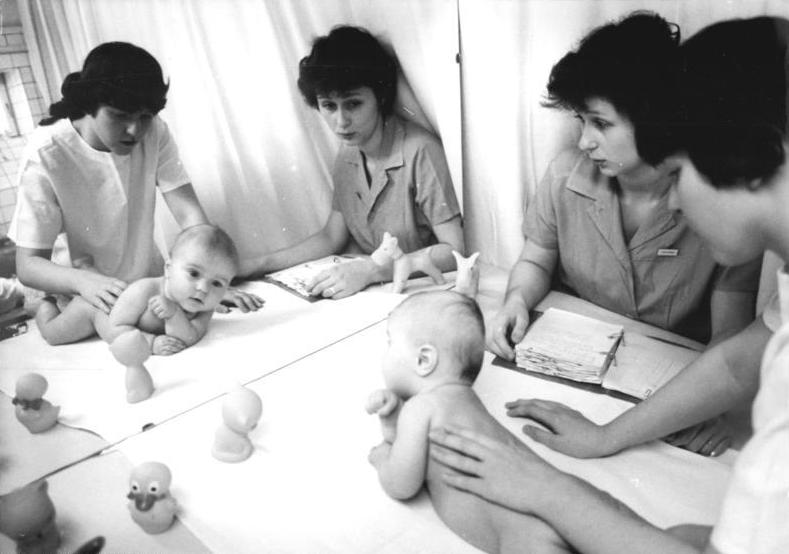 Wermsdorf, Klinik Hubertusburg, Jugendkollektiv ADN-ZB Grubitzsch 24.1.84 Bez. Leipzig: Säuglingsgymnastik fördert die altersgerechte Entwicklung bei dem sechs Monate alten Marcus und bei den anderen kleinen Patienten im Kinderzentrum der Kliniken Hubertusburg. Physiotherapeutin Kerstin Leuschner (2.v.r.) unterstützt die Praktikantin Marion Klingner (r.) dabei. Die Physiotherapeutin gehört dem Jugendkollektiv "Jussuf Ibrahim" in der Abteilung Pädiatrie an, das im vergangenen Jahr mit dem Titel "Hervorragendes Jugendkollektiv der DDR" ausgezeichnet wurde. Das Kinderzentrum der Kliniken in Wermsdorf, Bez. Leipzig, ist in einem über 200jährigen ehemaligen Schloß untergebracht. Es verfügt u.a. über die Abteilungen Allgemeine Pädiatrie, Kinderchirurgie und Rehabilitation. Ca. 200 Patienten vom Säuglings- bis zum Jugendalter können aufgenommen werden.